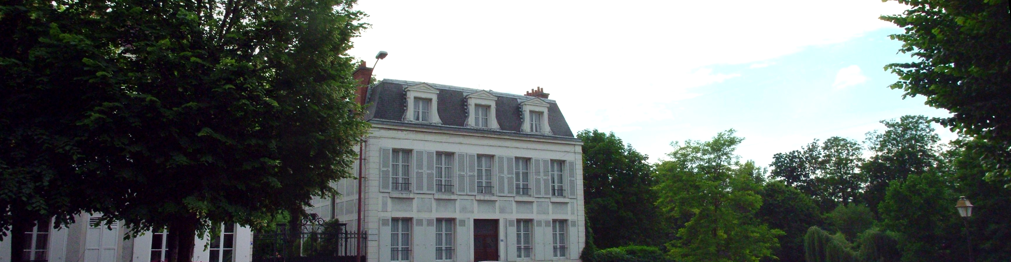 Maison de Claude Monet à Poissy nommée Villa Saint Louis; où il y vécut de décembre 1881 à avril 1883.